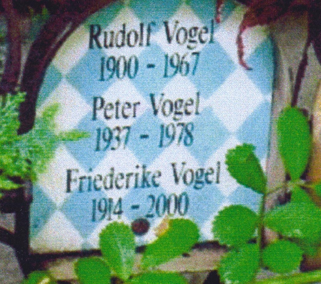 Friedhof Bogenhausen-Peter Vogel